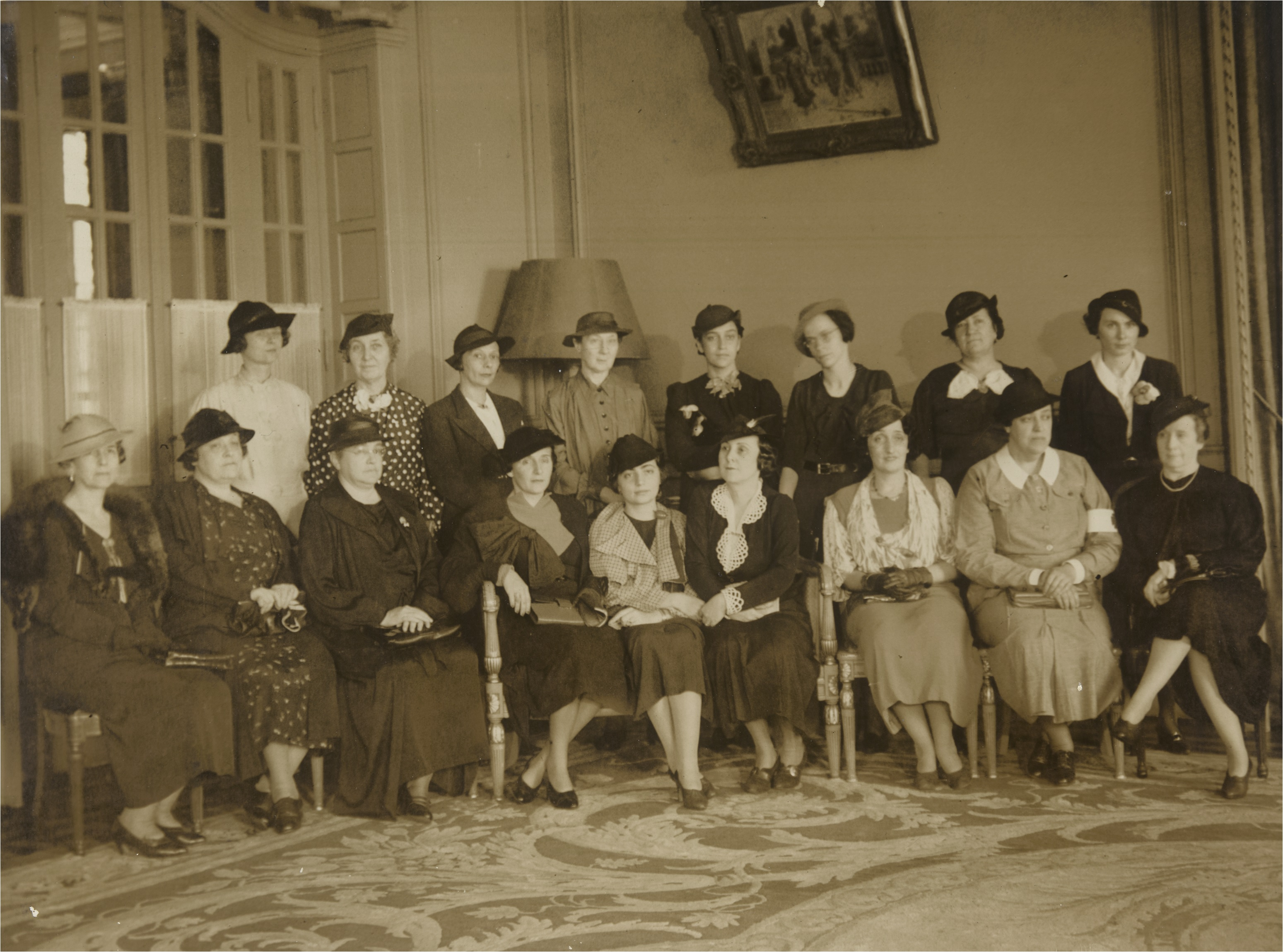 Almoço oferecido a Maria Luísa Bittencourt, eleita Deputada Constituinte na Bahia, no Hotel Glória, Rio de Janeiro. Fundo: Federação Brasileira pelo Progresso Feminino.